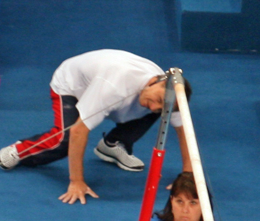 Salto Pak, Nastia Liukin